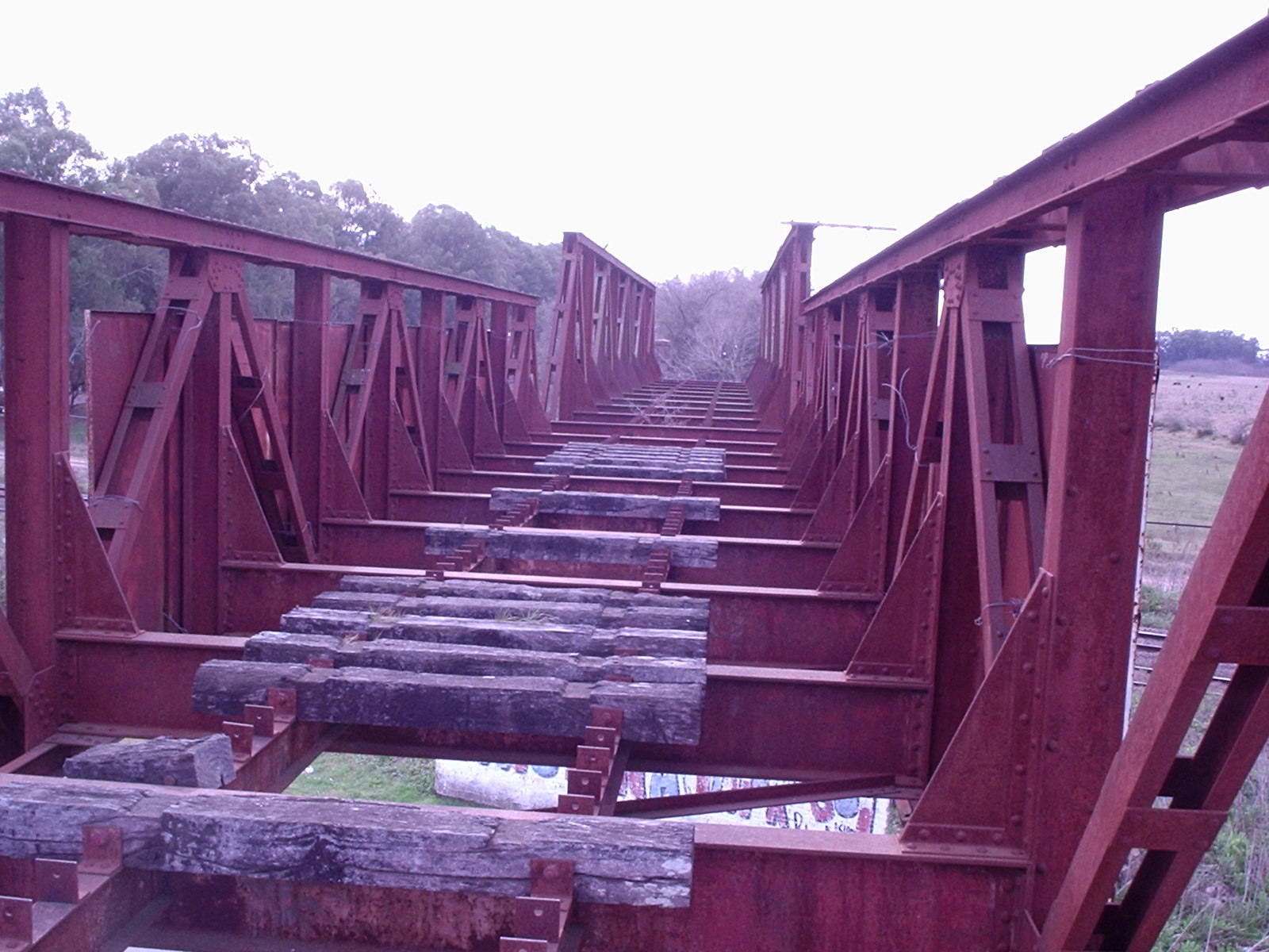 Puente que perteneció al ferrocarril provincial de Buenos Aires. La estructura cruza la ruta provincial numero 29 y las vías del Ferrocarril Roca cerca de la ciudad de Brandsen, provincia de Buenos Aires, Argentina. Las vías fueron levantadas en la década de 1960.